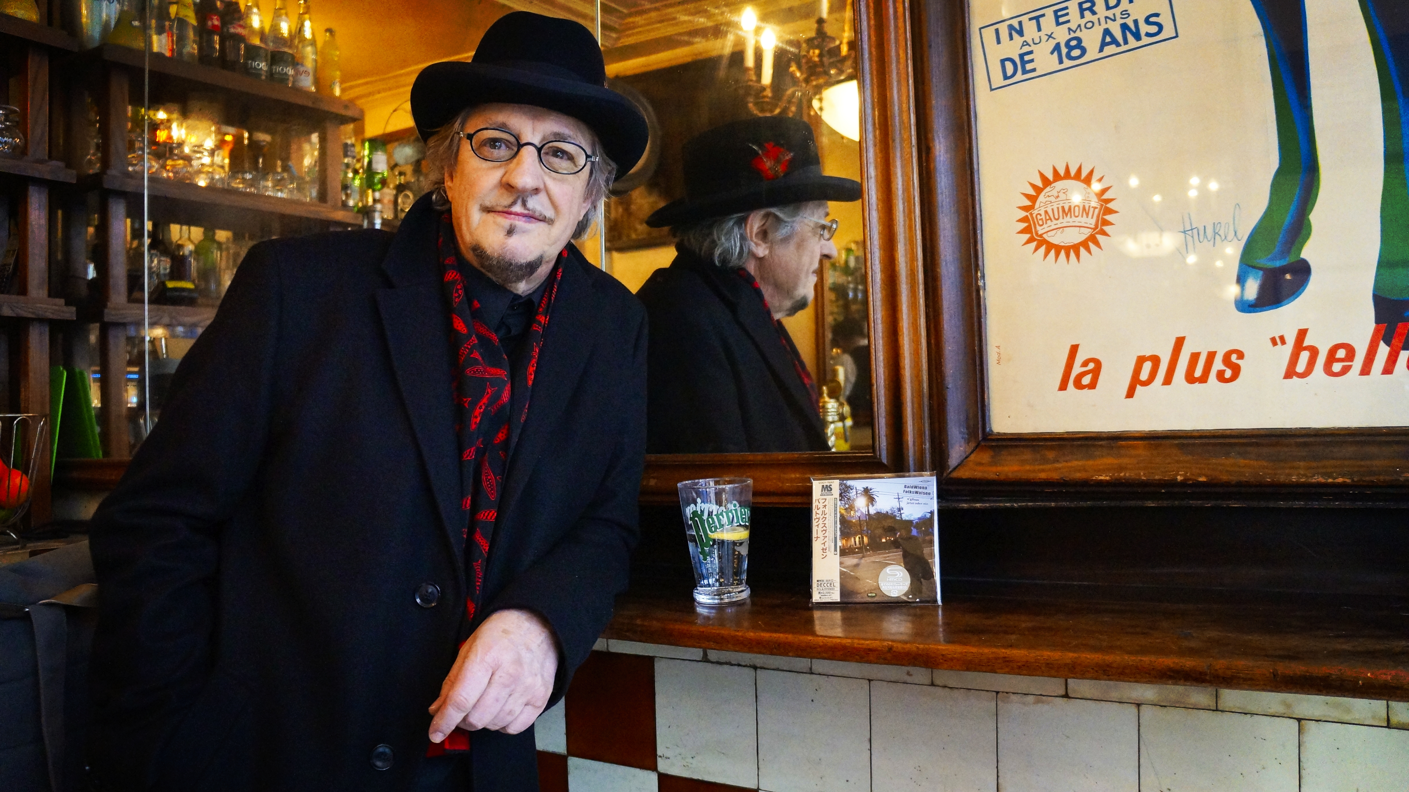 Bild des Autors und Musikers Heinz D. Heisl